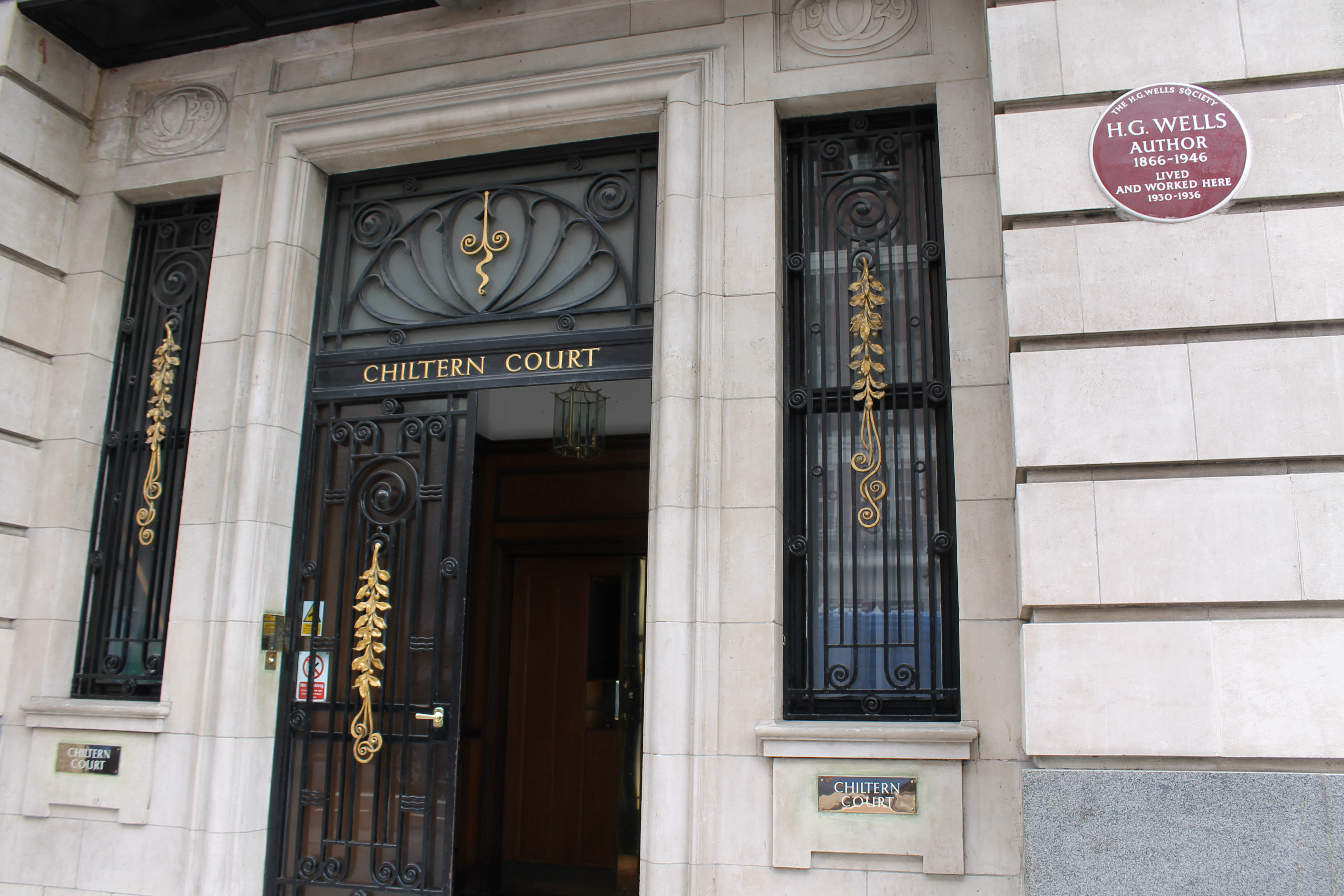 H.G.Wells house, London